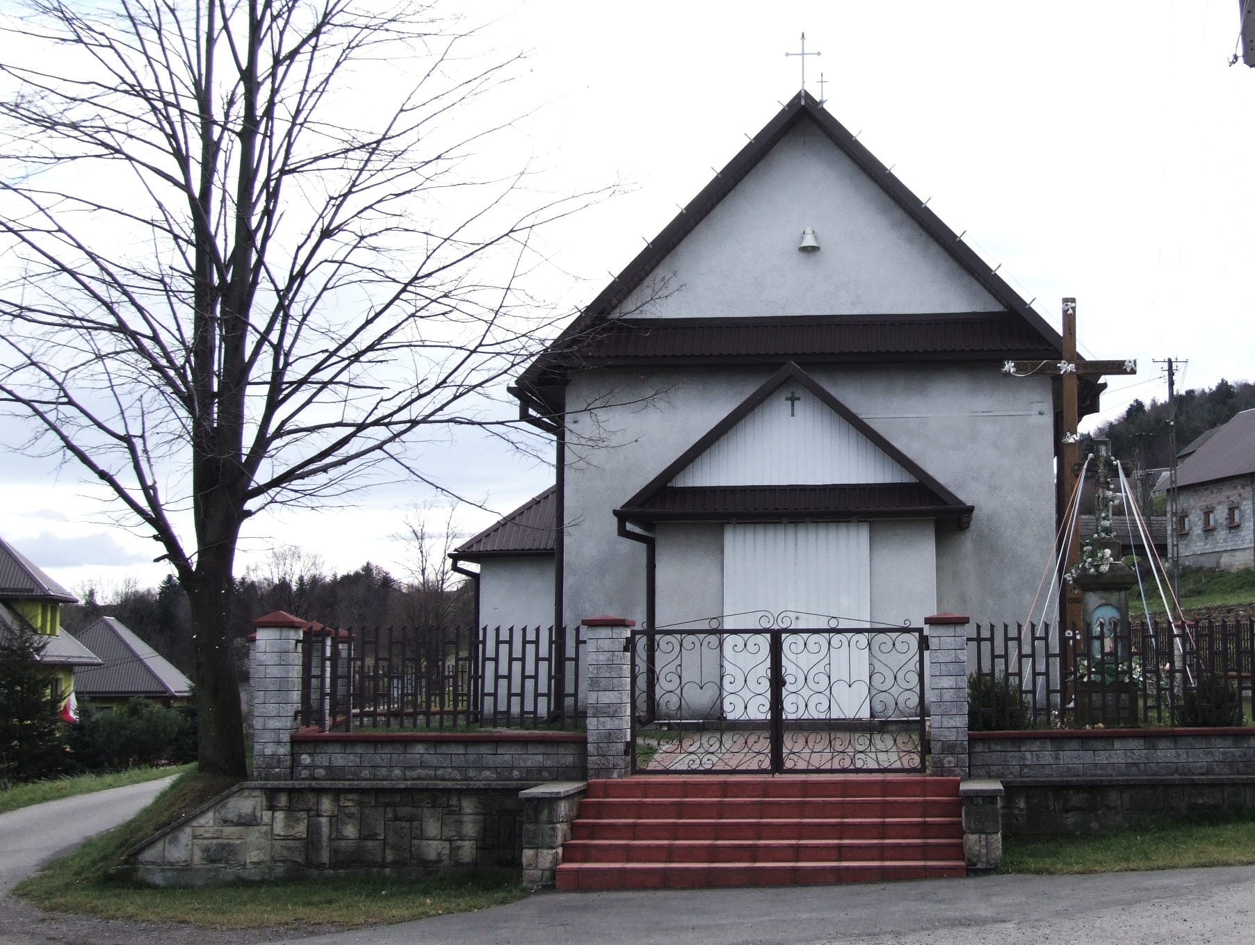 Kaplica w Rajbrocie